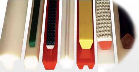 PU-Profilriemen